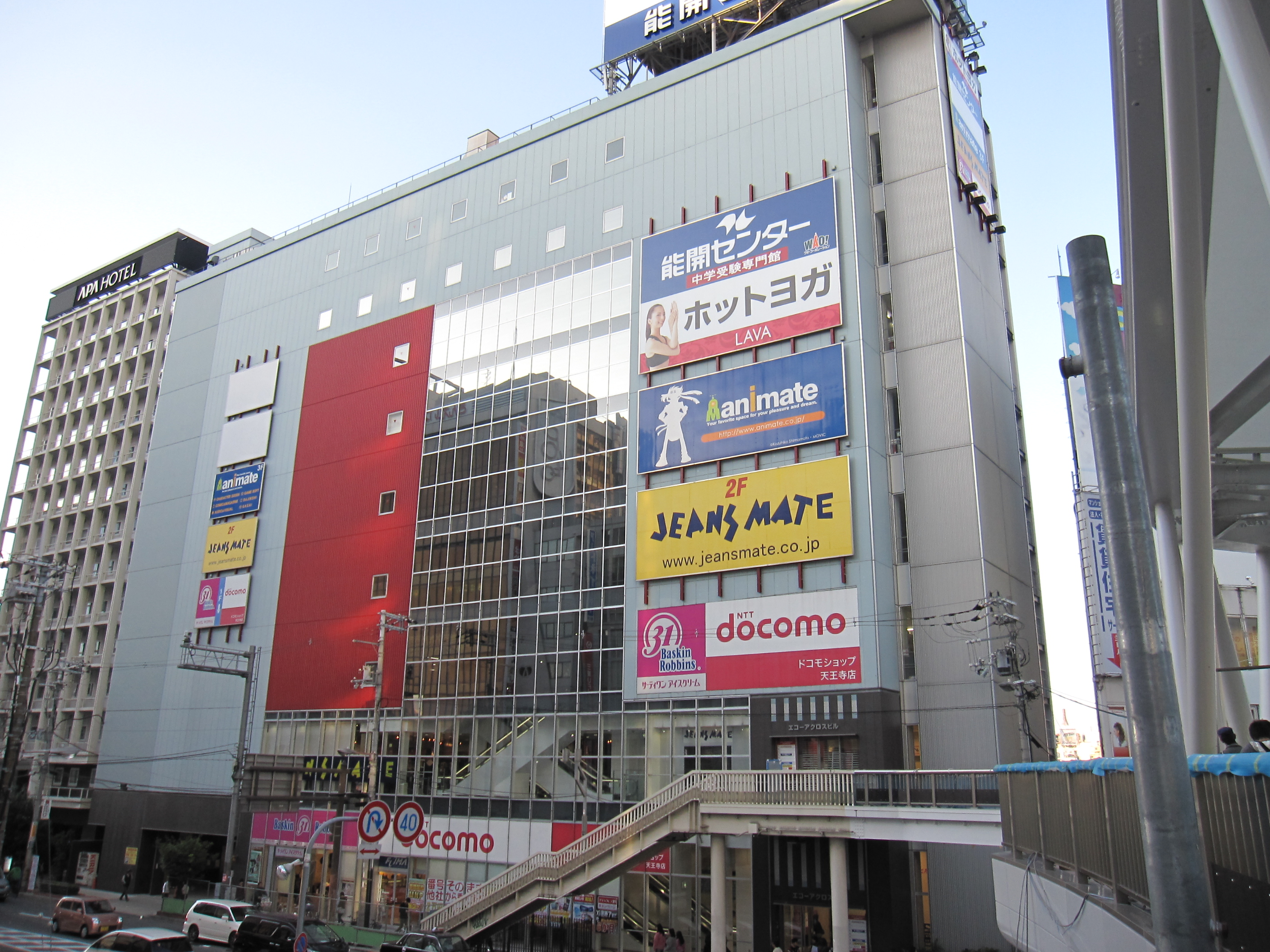 エコーアクロスビル